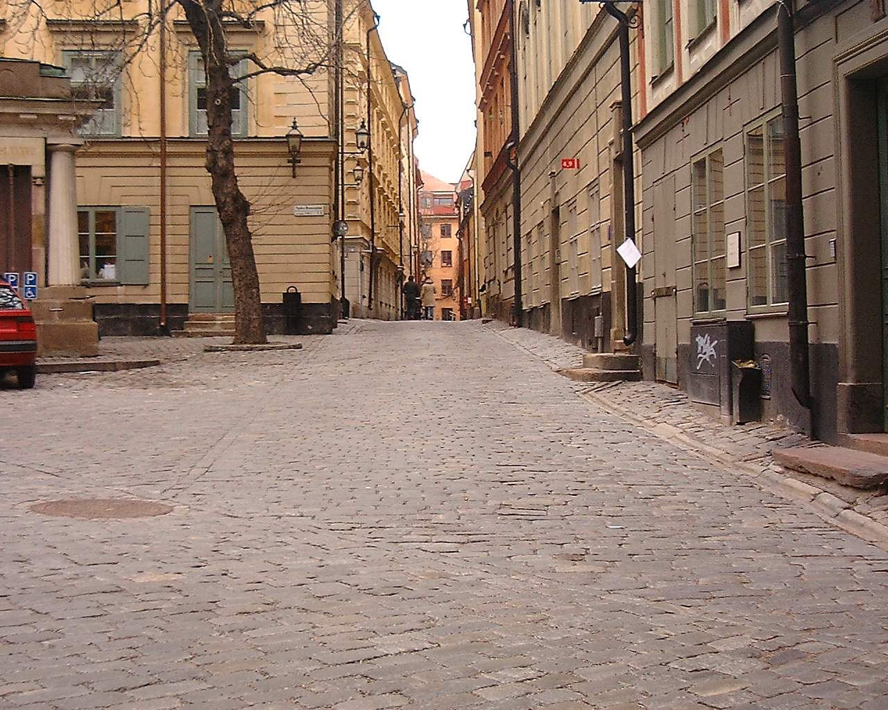 Själagårdsgatan viewed from Tyska Stallpaln, Gamla stan, Stockholm.